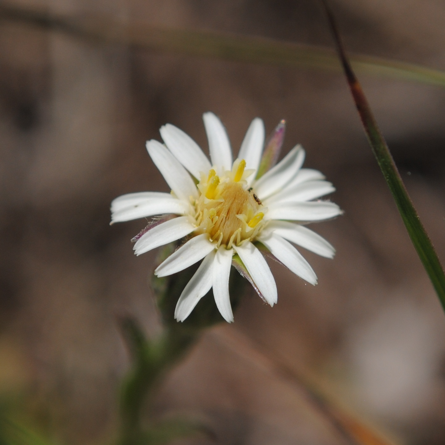 Noticastrum marginatum. Asteraceae. Fotos tomadas sobre suelo pedregoso en laderas al margen del Río Negro en Palmar, departamento de Soriano, Uruguay.